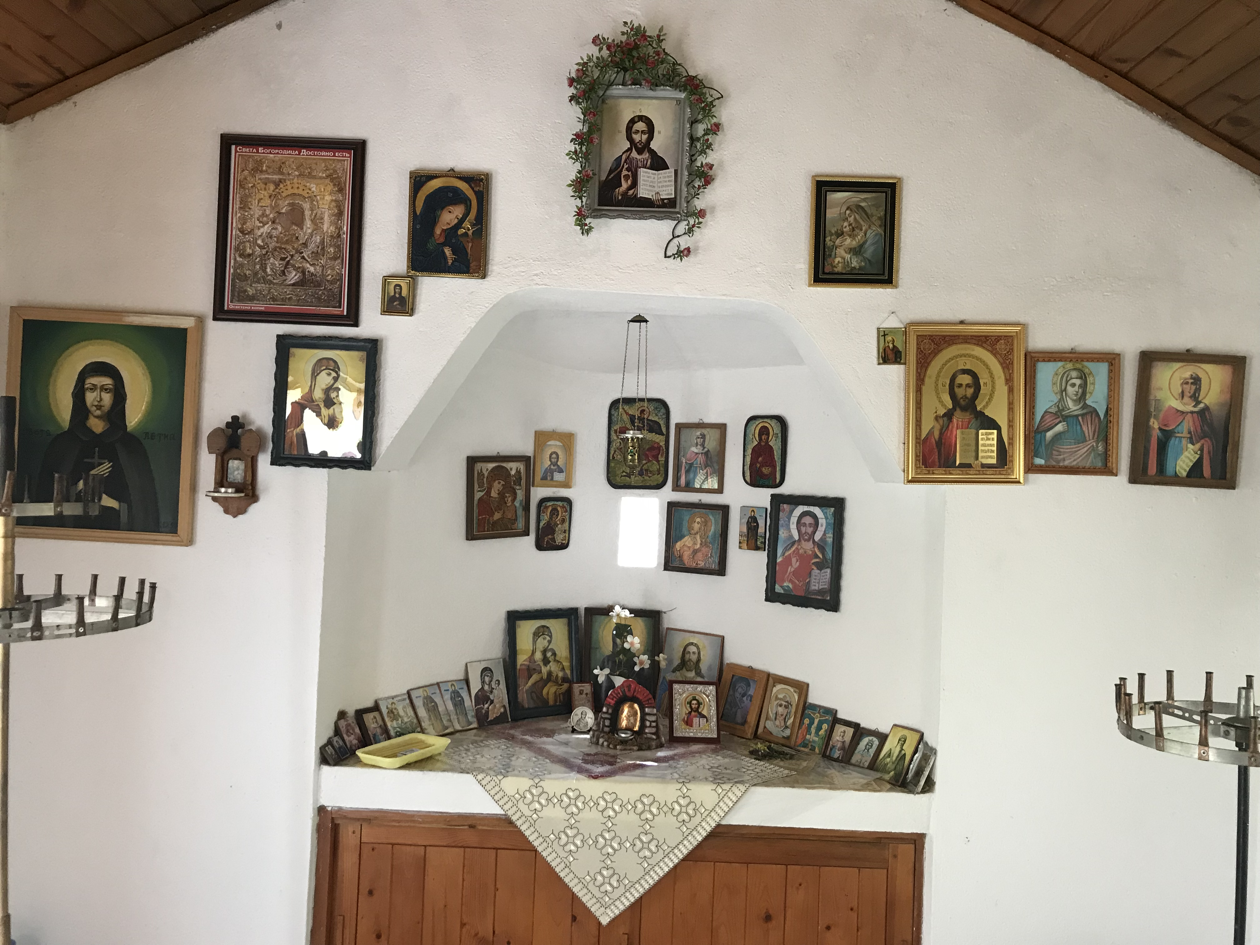 Икони в “Света Петка”, с. Бойково